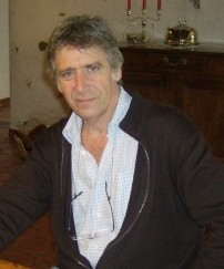 Yves Duteil, chanteur français.